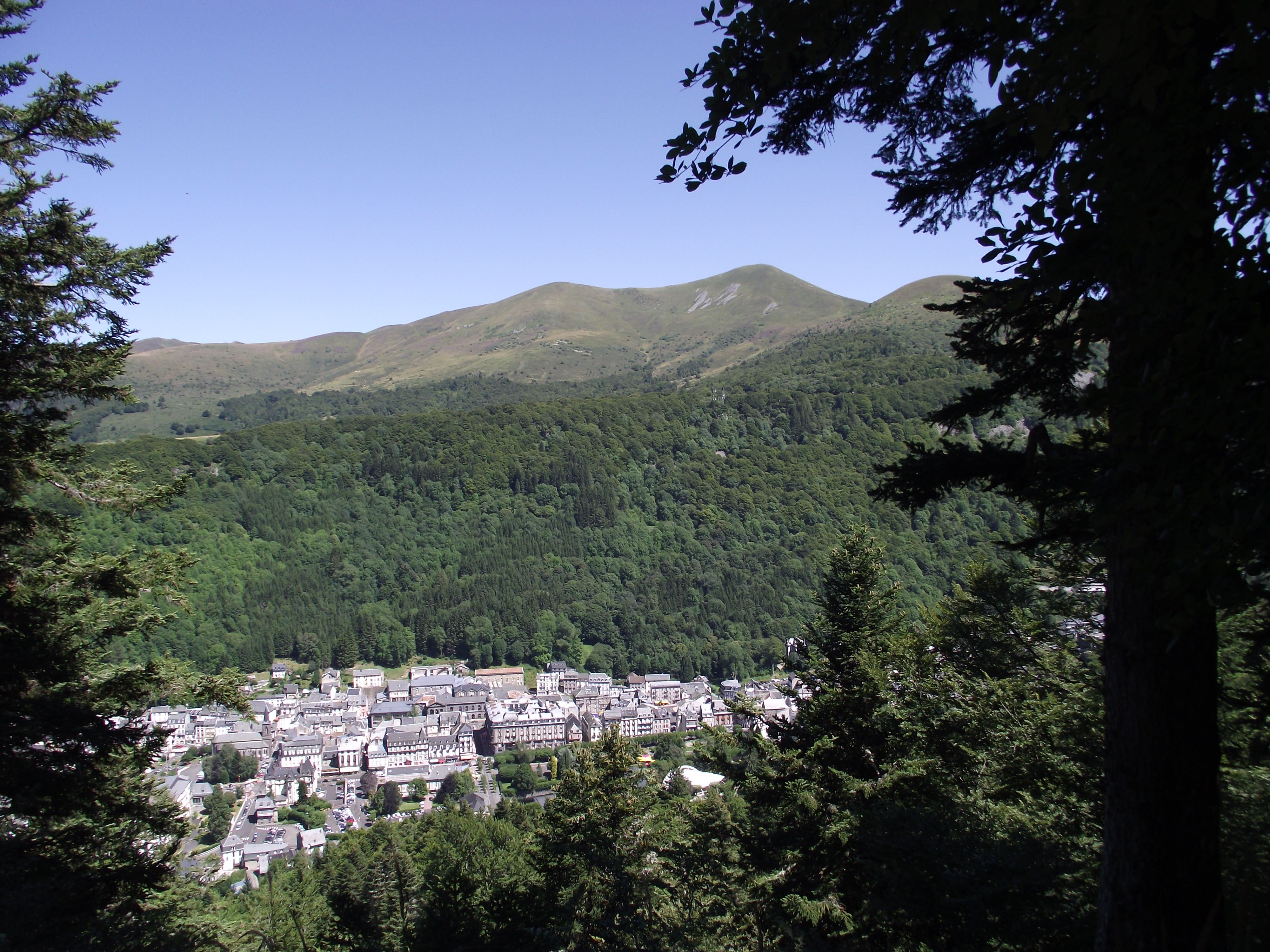 Le Mont-Dore (63) vu de la forêt du Capucin.